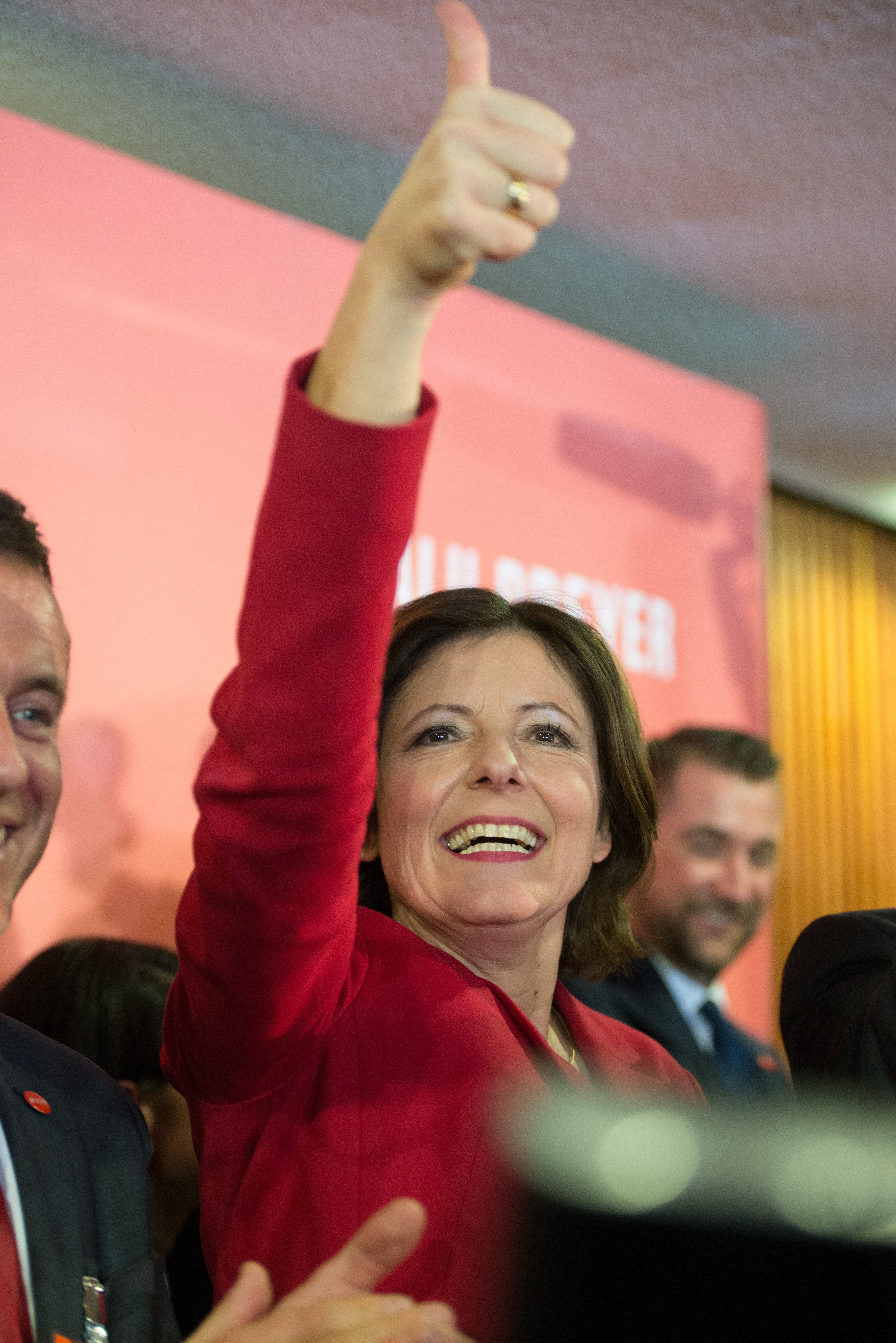 Wahlparty der SPD am Abend der Landtagswahl in Rheinland-Pfalz am 13. März 2016 im Abgeordnetenhaus